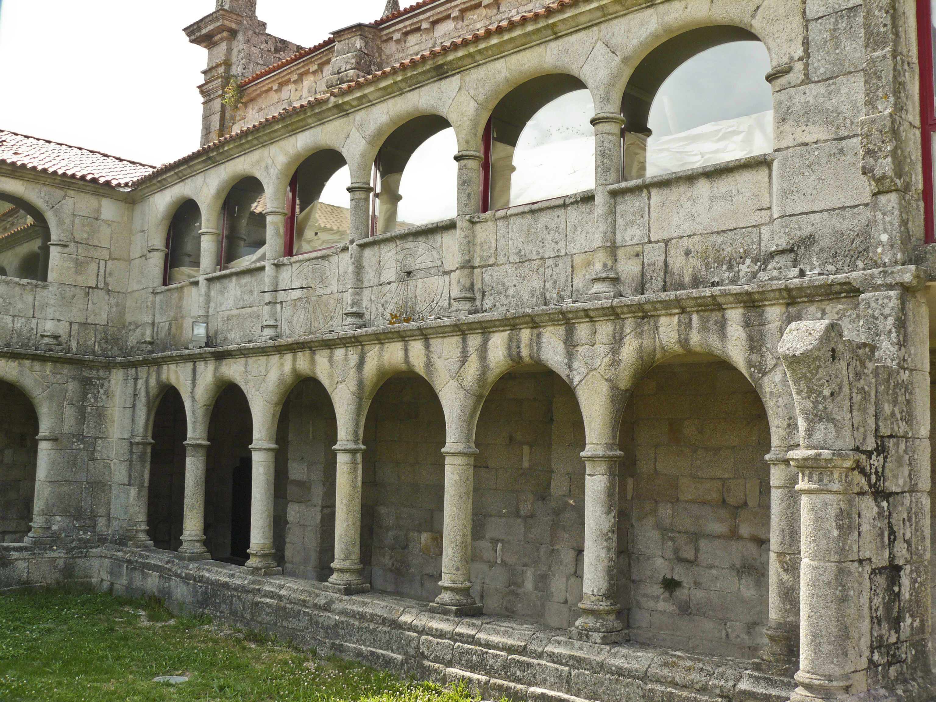 Mosteiro de Xunqueira de Espadañedo